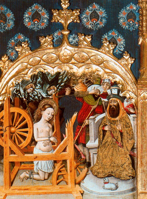 detail del Retablo de Santa Catalina mártir